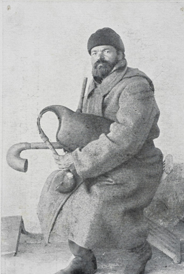 Беларуская (тарашкевіца): Беларускі дудар зь Дзісенскага павету Віленскай губэрні